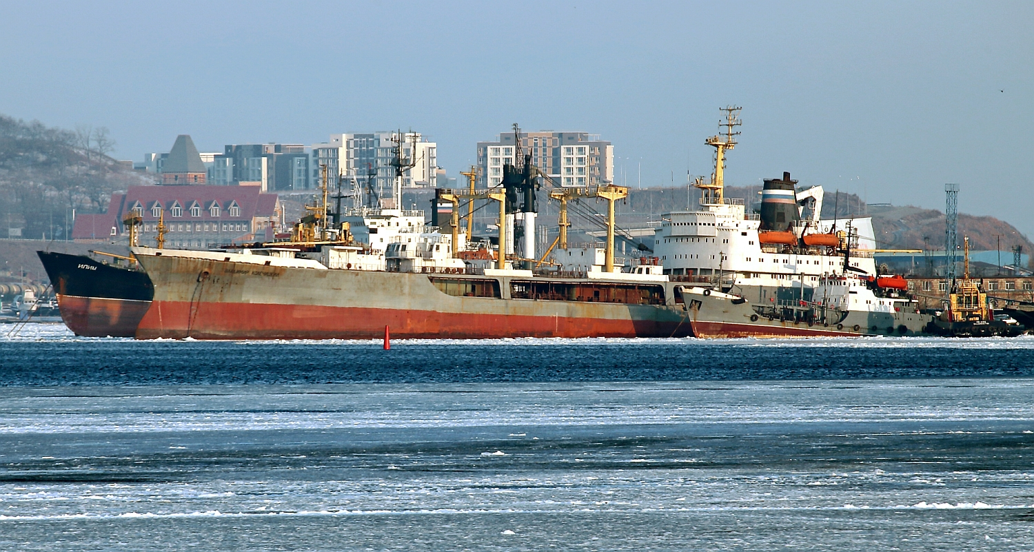 Суда обеспечения в бухте Большой Улисс, Владивосток. БМТ СМТ «Владимир Колечитский» пр.1559-В, СМТ «Илим» и неопознанный ВТН. 2015.02.05